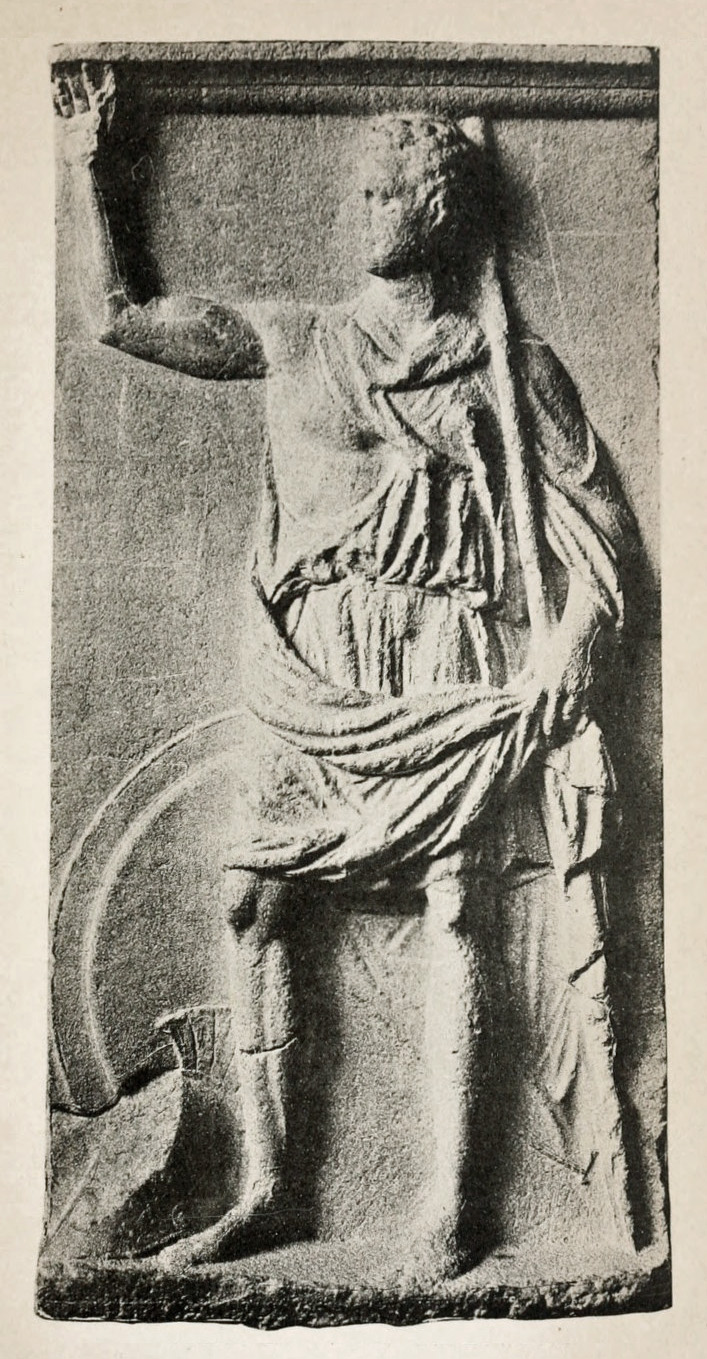 Relief eines Kriegers. Gefunden in Kleitor.